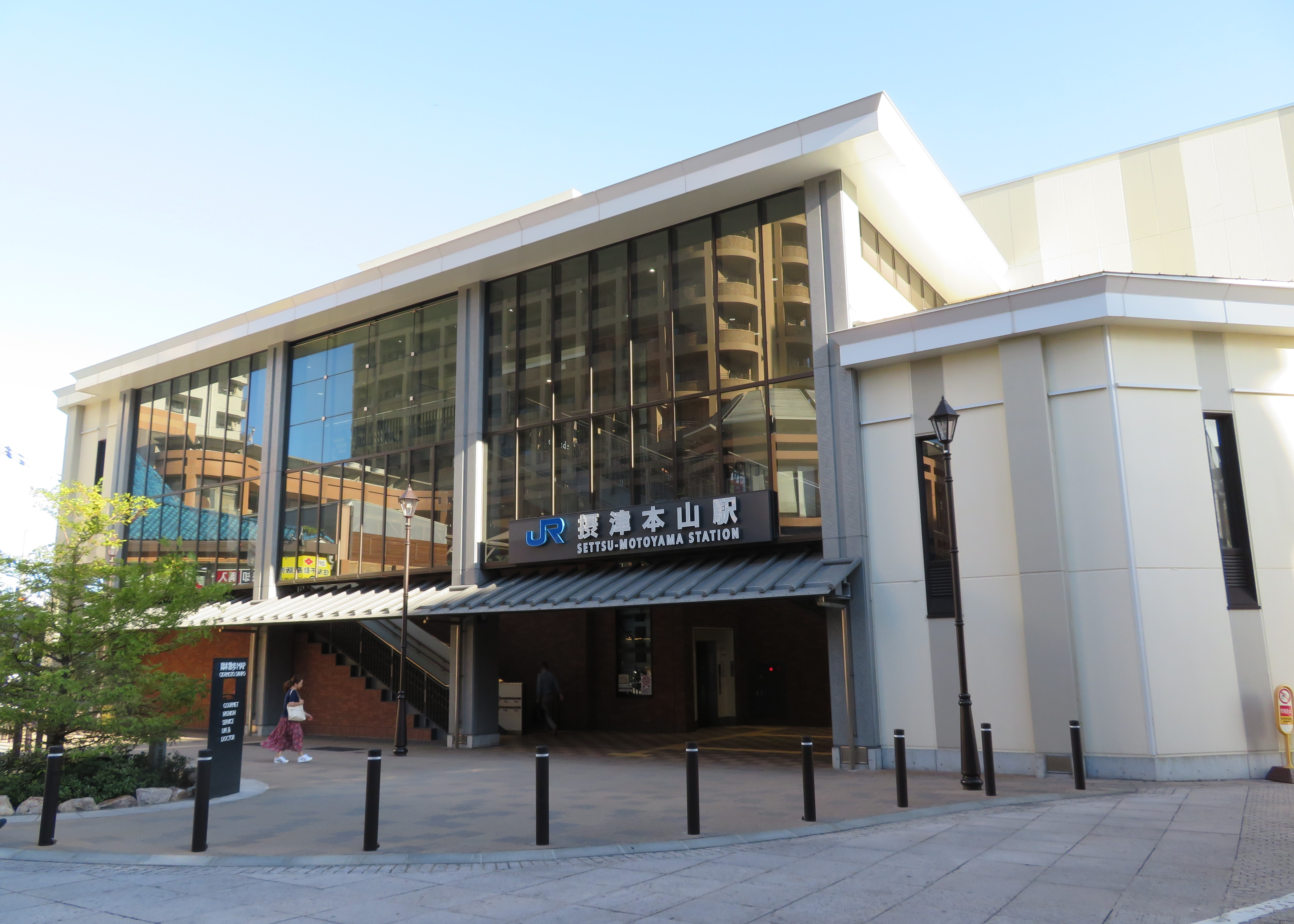 JR摂津本山駅北口